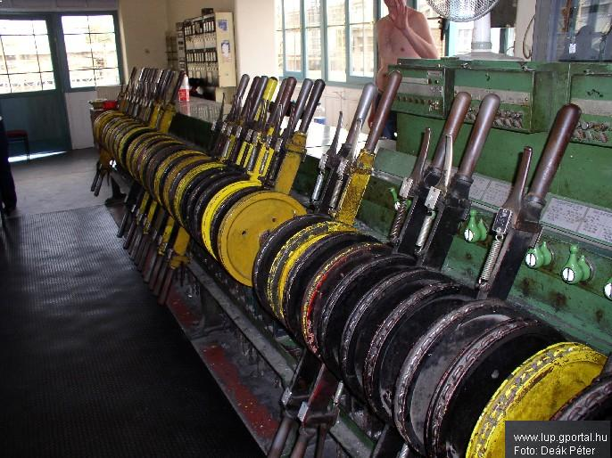 Váltókezelői állító készülék